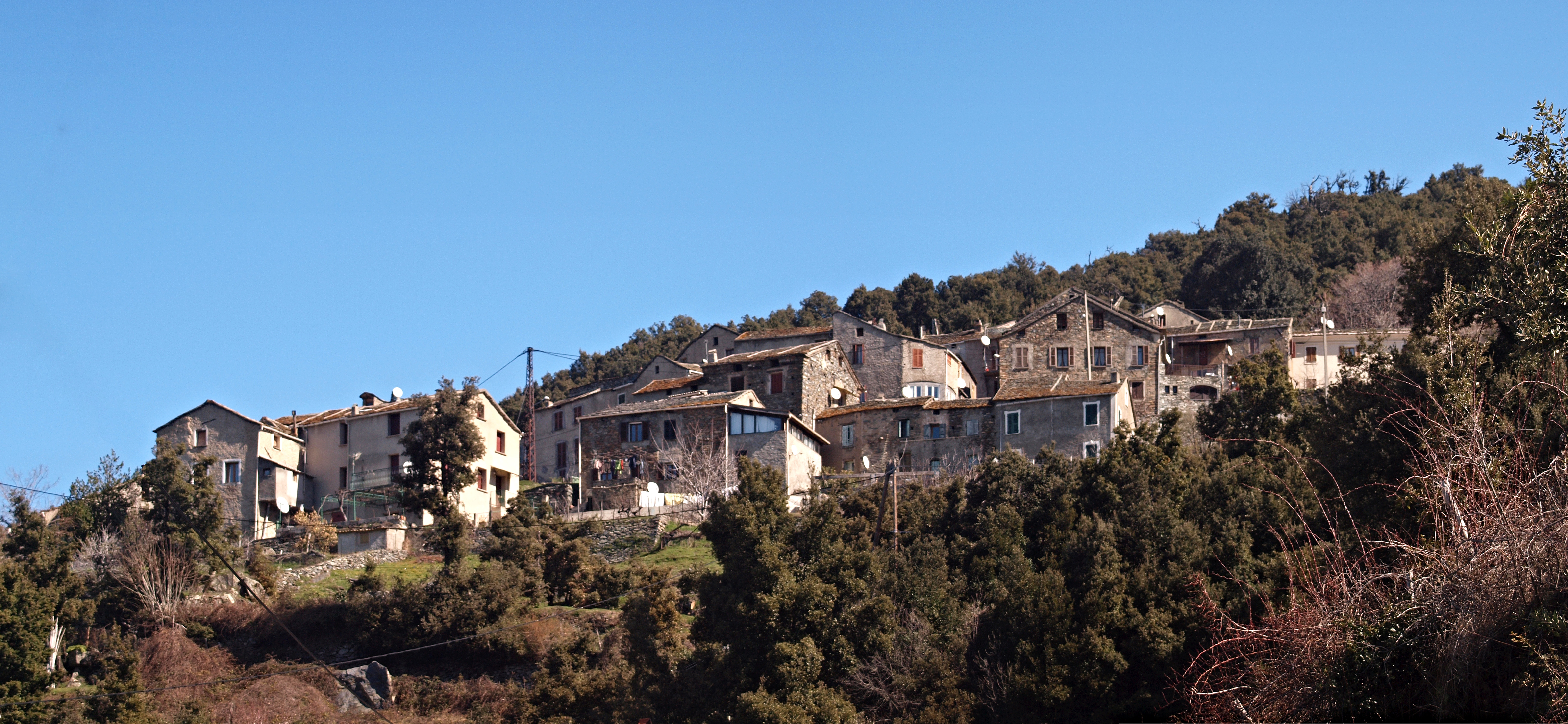 Corsu: Bisinchi, Rustinu (Corsica) - U bassu di u paese